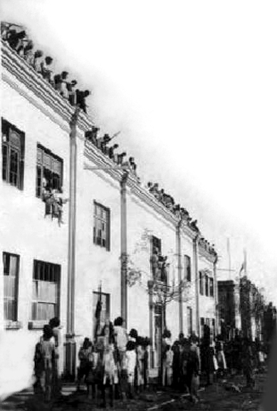 Frontis del Colegio Independencia en uno de sus tres pabellones